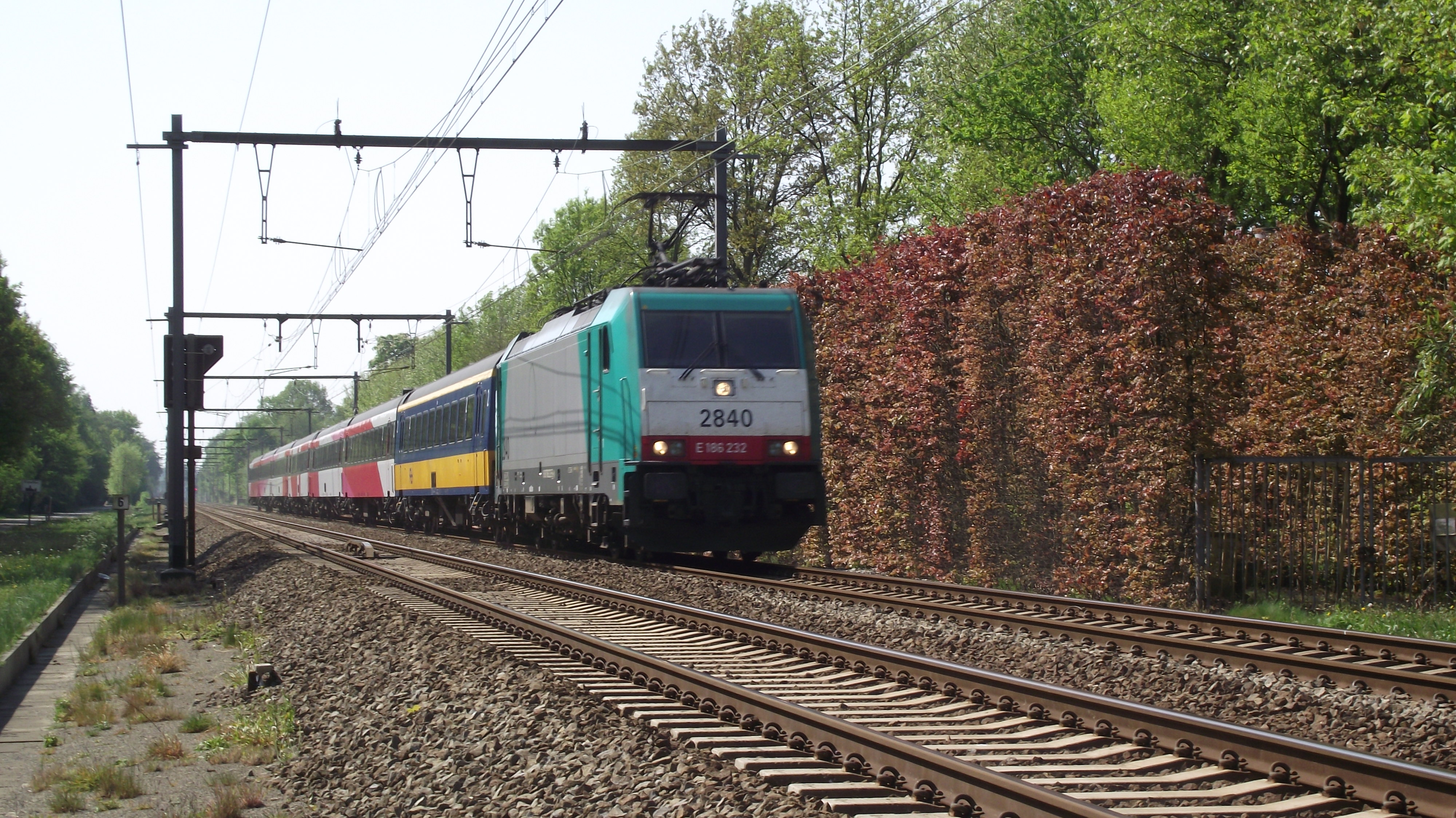 Beneluxtrein met gemengde compositie ten noorden van Kapellen.